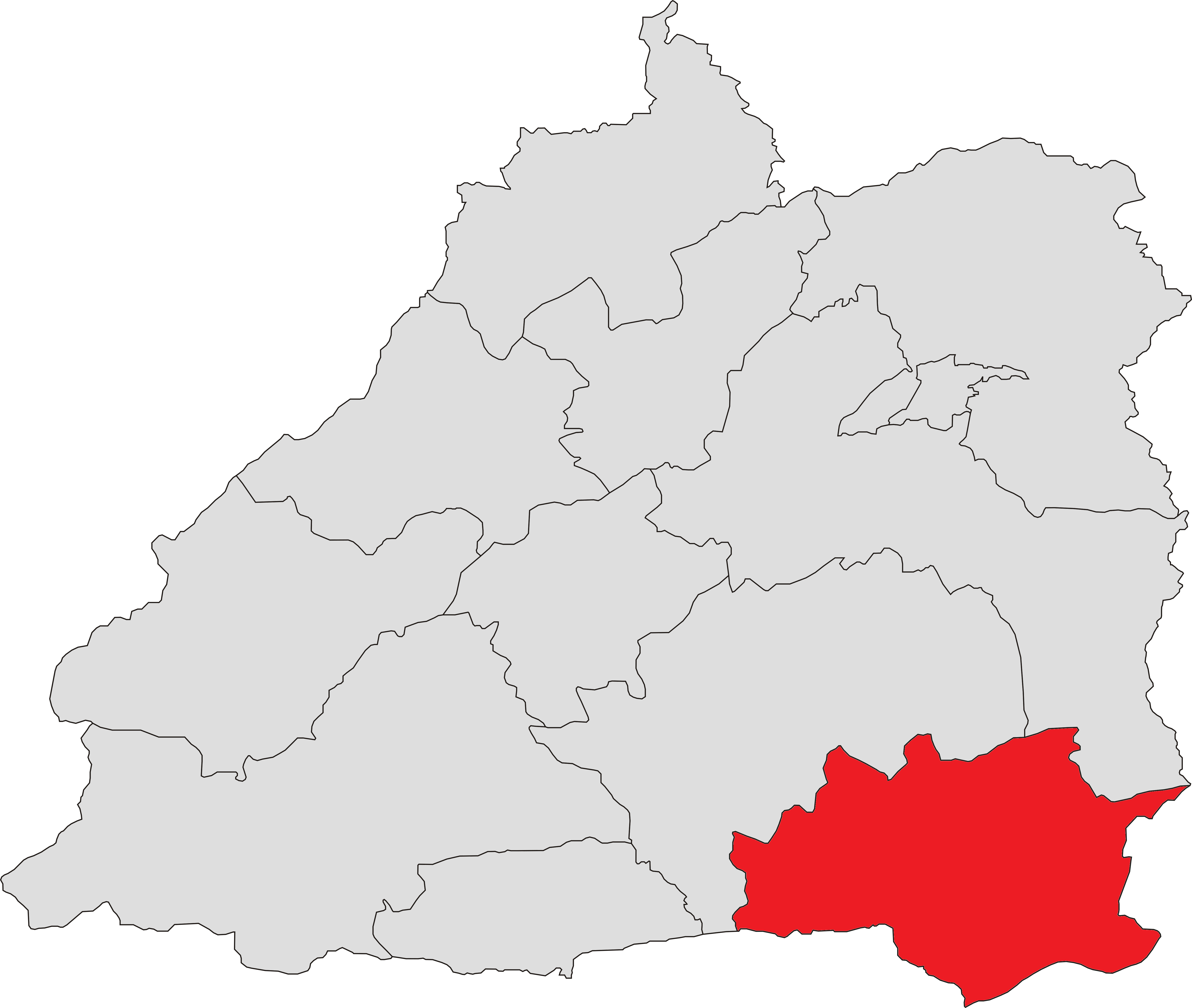 中文（中国大陆）: 芒市中山乡位置图